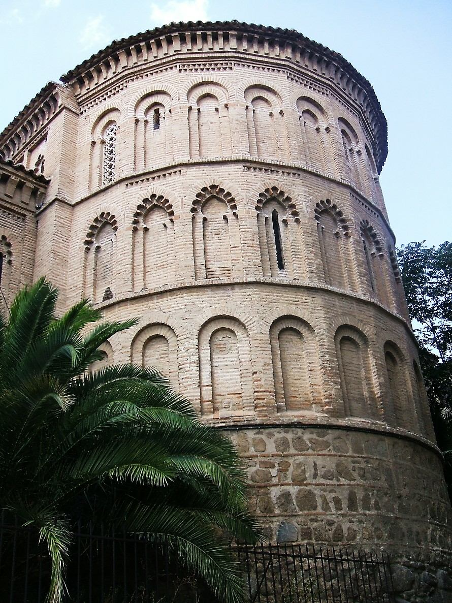 Ábside de la iglesia de San Bartolomé, Toledo (España)